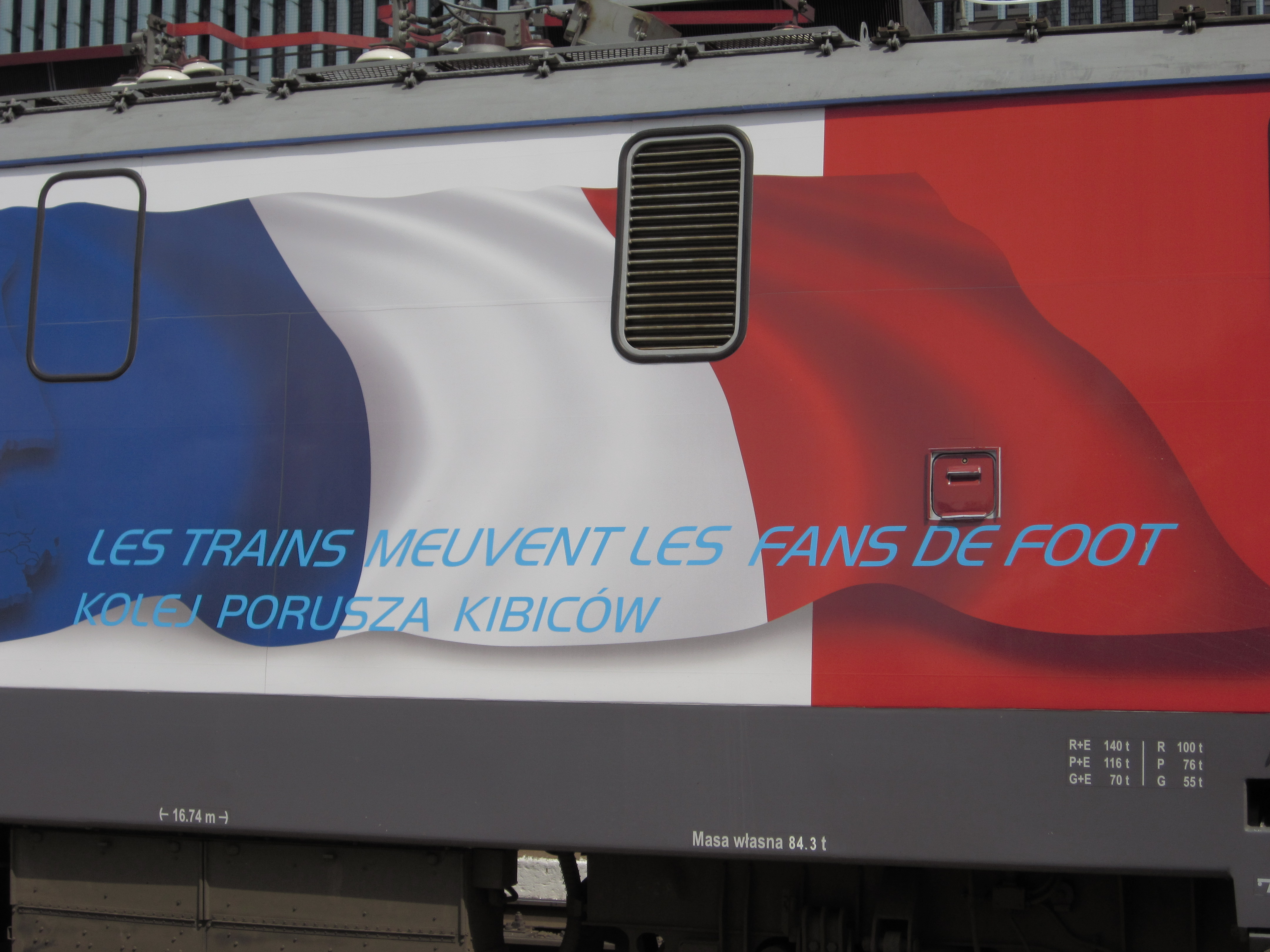 Lokomotywa EP09-042 oklejona w barwy Francji z okazji EURO 2012.